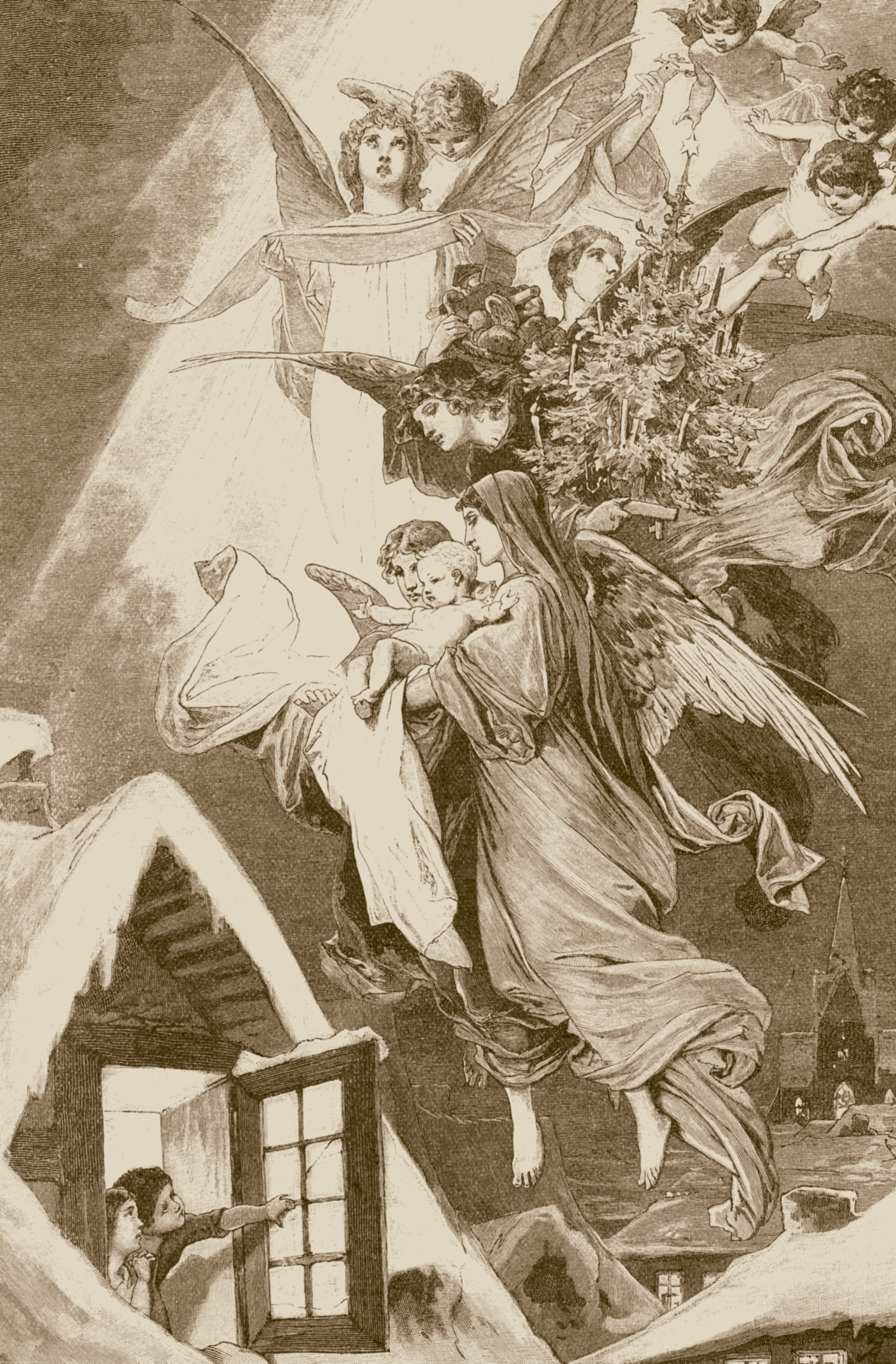 Stadt Gottes, Illustrierte Zeitschrift für das katholische Volk, Sammelband 1893